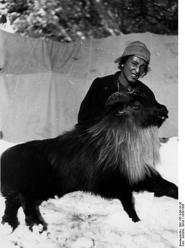 Erbeutete Schapis